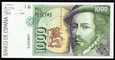 1000 pesetas del 92.